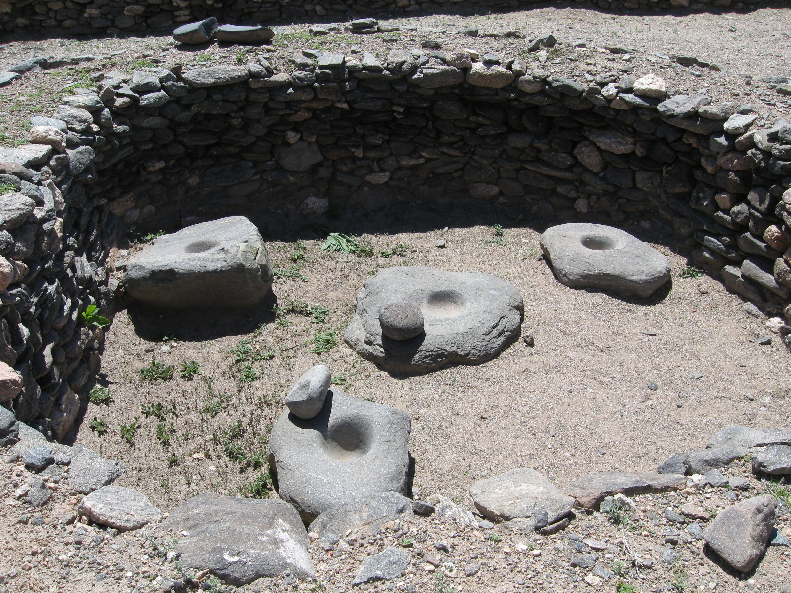 Morteros antigüos en las Ruinas Quilmes